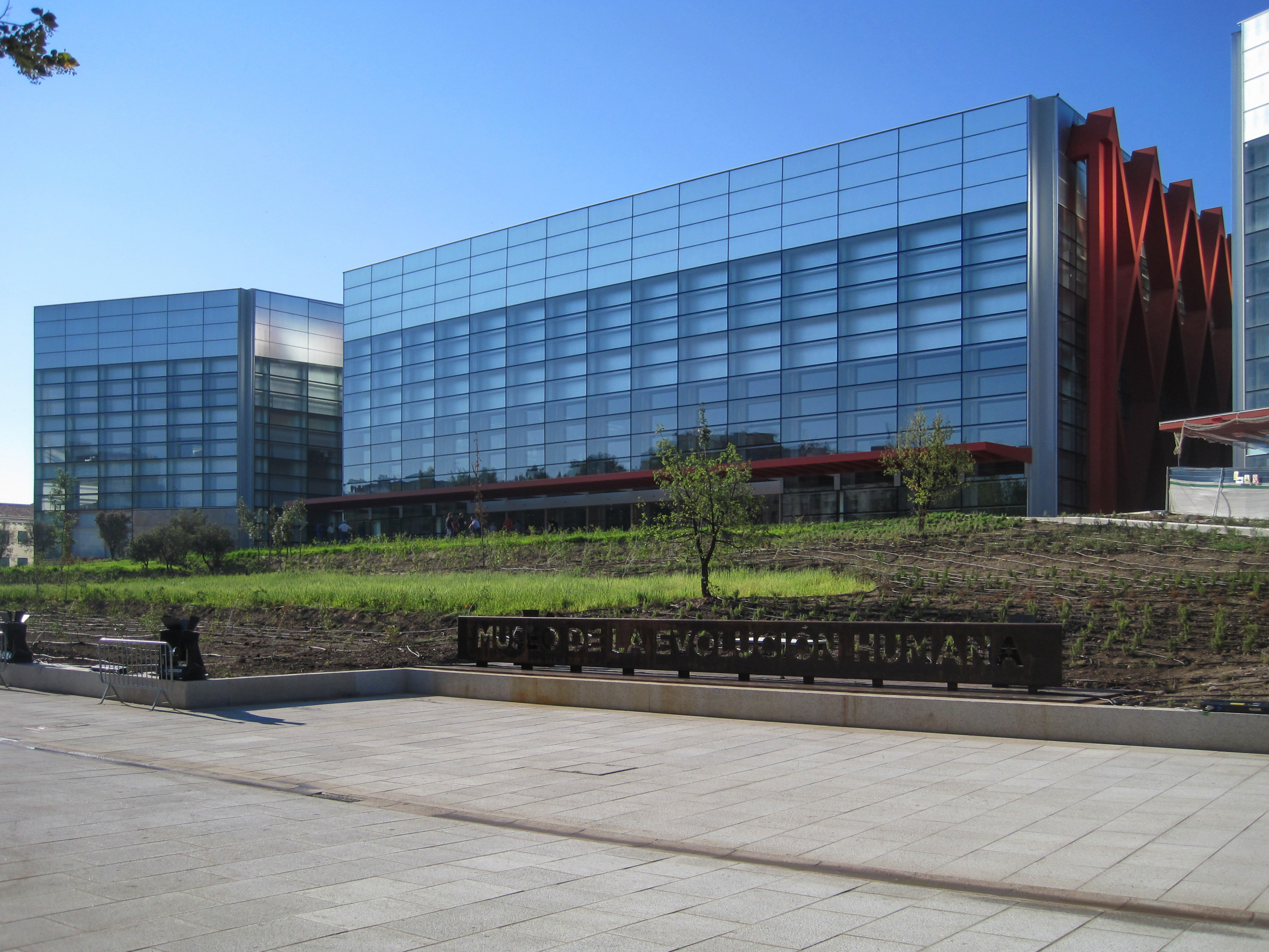 Vista del Museo de la Evolución Humana de Burgos, la mañana de su inauguración.